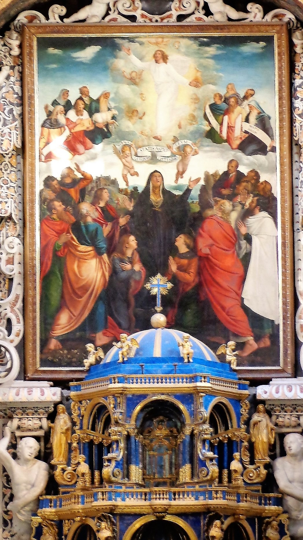 Dipinto.